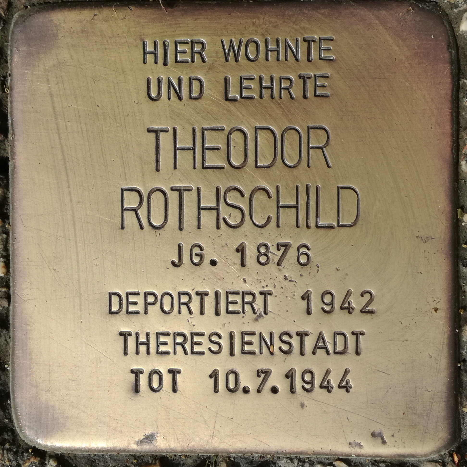 Hier wohnte und lehrte Theodor Rothschild Jahrgang 1876 deportiert 1942 Theresienstadt tot 10.7.1944